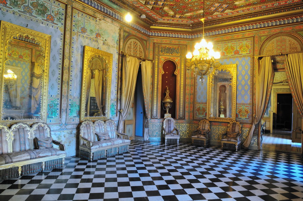 Fotografia del Saló Àrab del Museu Palau Mercader de Cornellà de Llobregat feta pel fotògraf M.A. Tabernero